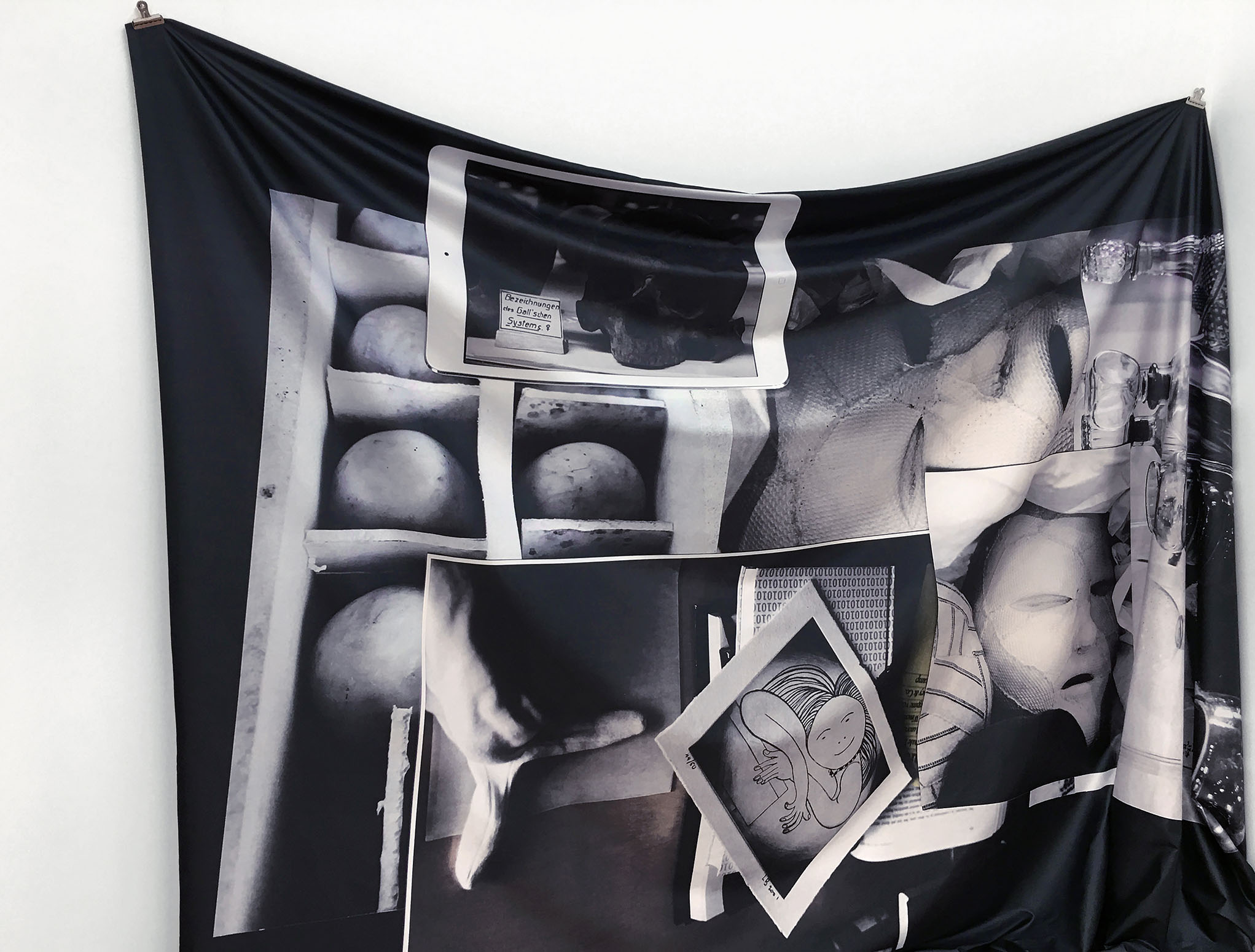 Dagmar Varady, I Don’t Like Passion, Gallery Paris London Hong Kong and Devening Projects, Chicago IL/USA.